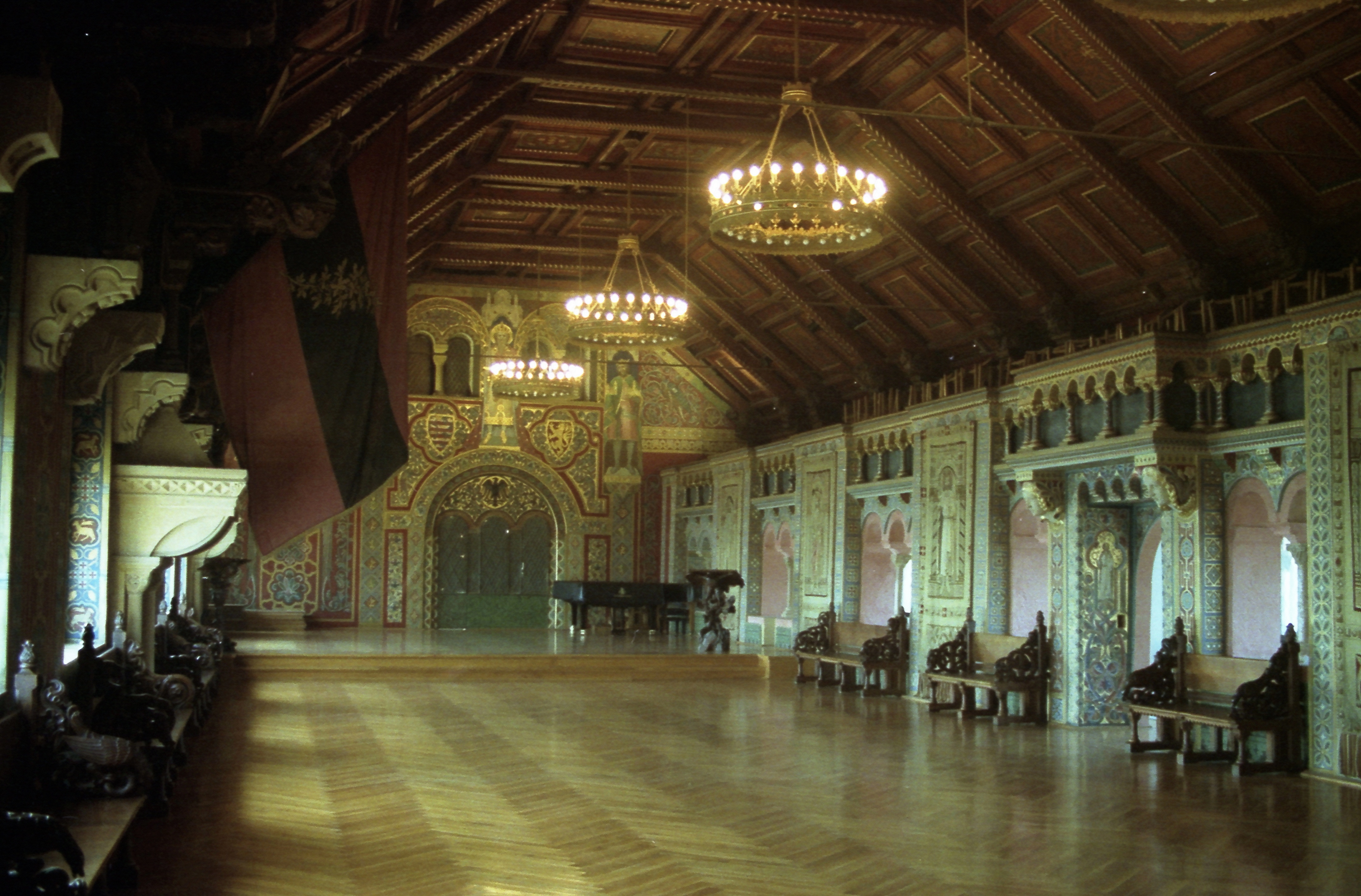 Festsaal auf der Wartburg Oktober 1992